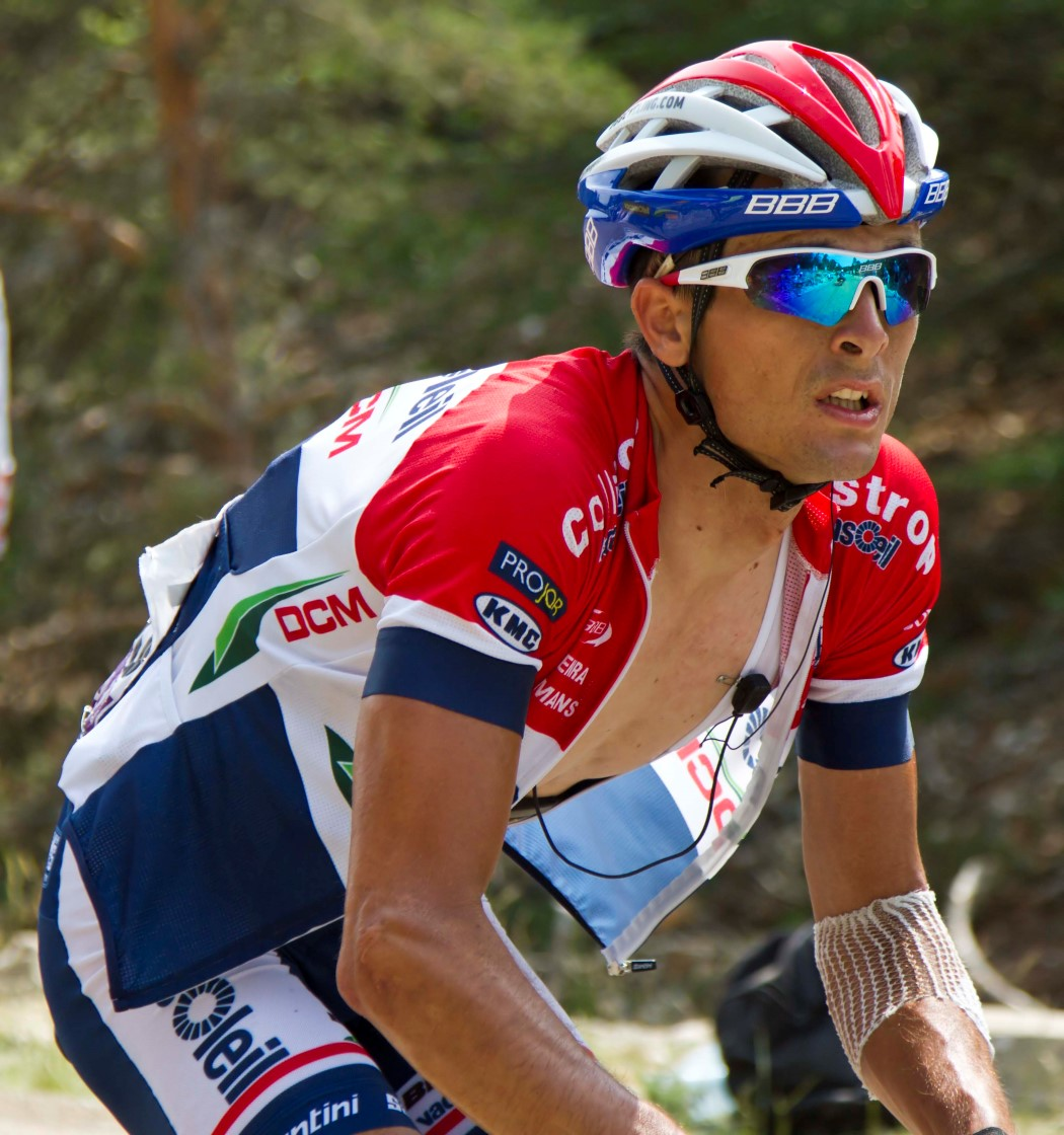 105 johnny